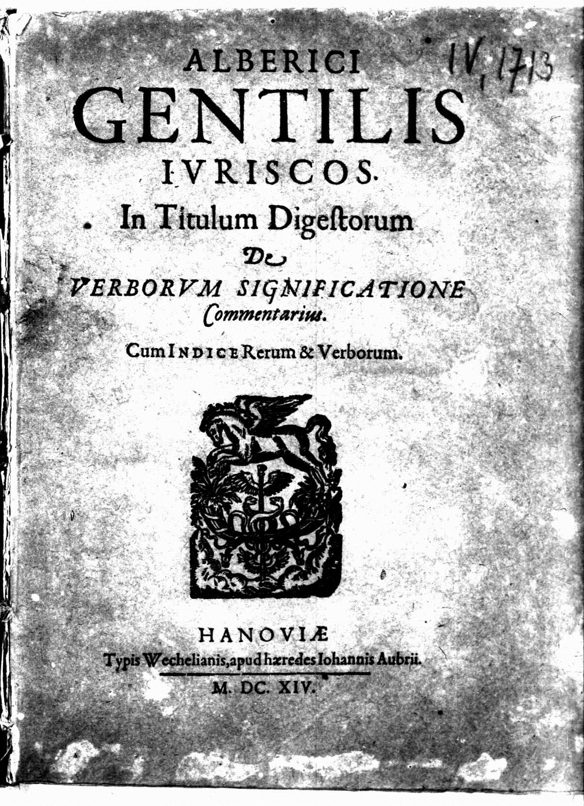 Frontespizio